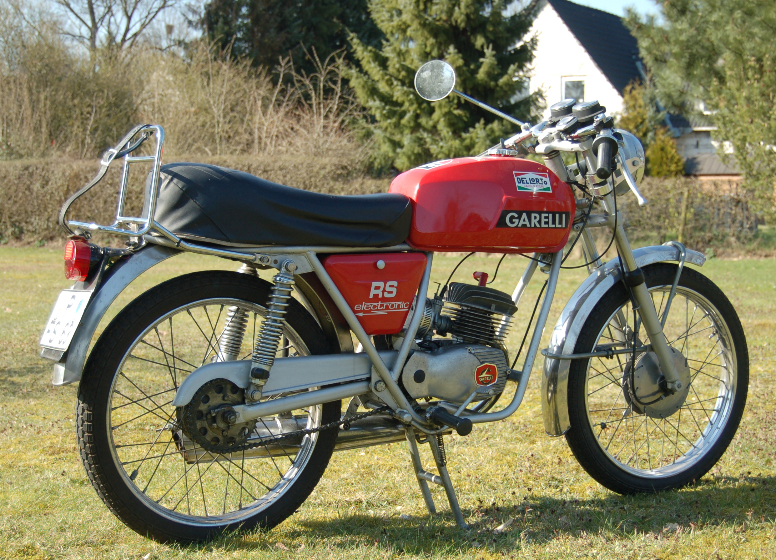 Garelli Rekord Baujahr 1973.